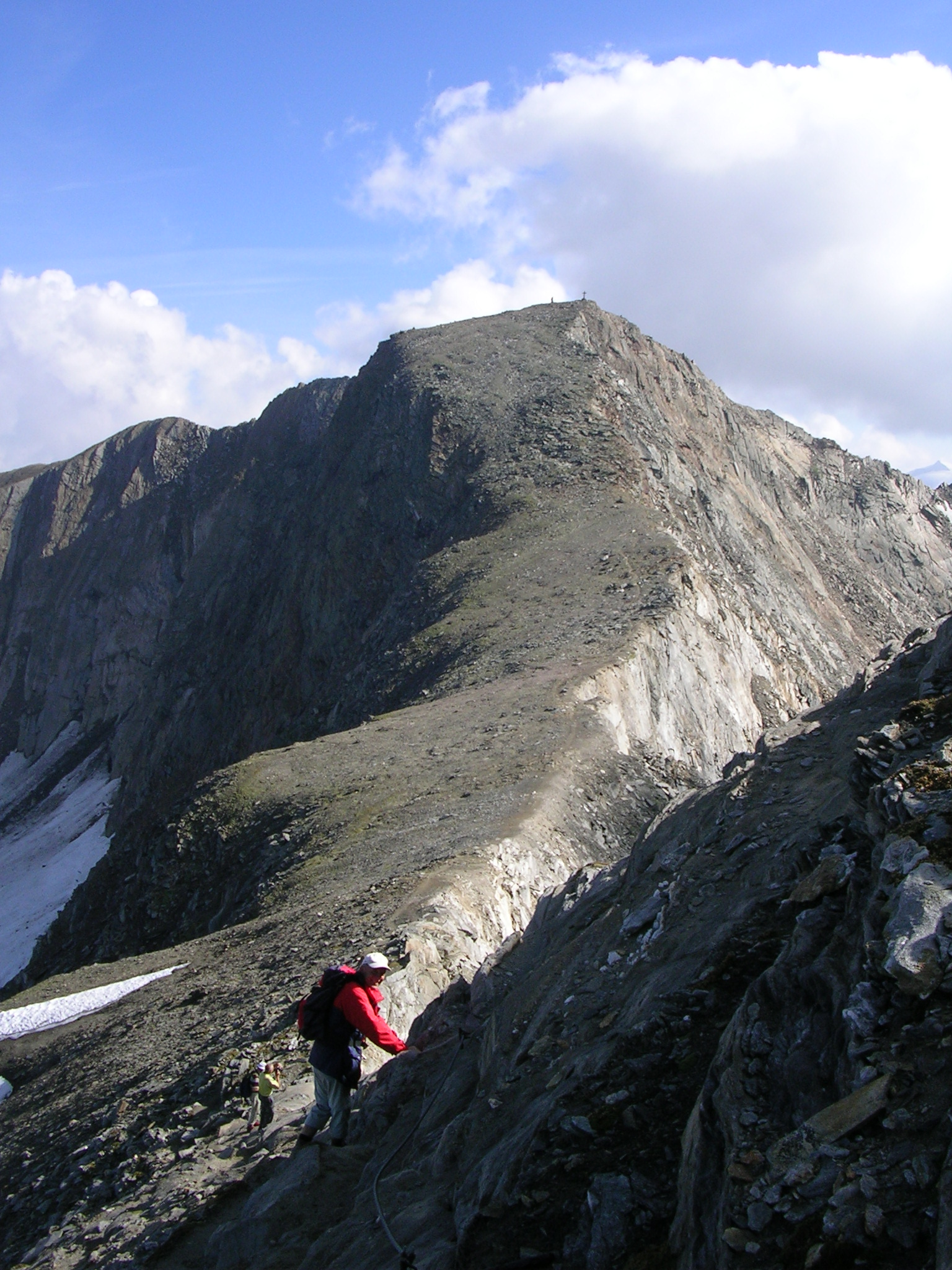 Der Große Muntanitz gesehen vom kleinen Muntabitz